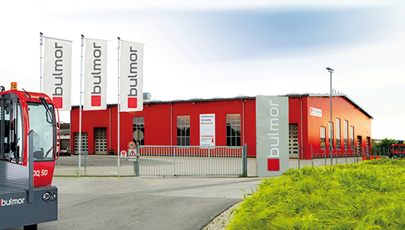 Firma Bulmor mit insgesamt 180 Mitarbeitern produziert Seitenstapler, Mehrwege Seitenstapler und Ambulift Fahrzeuge am Standtort in Perg